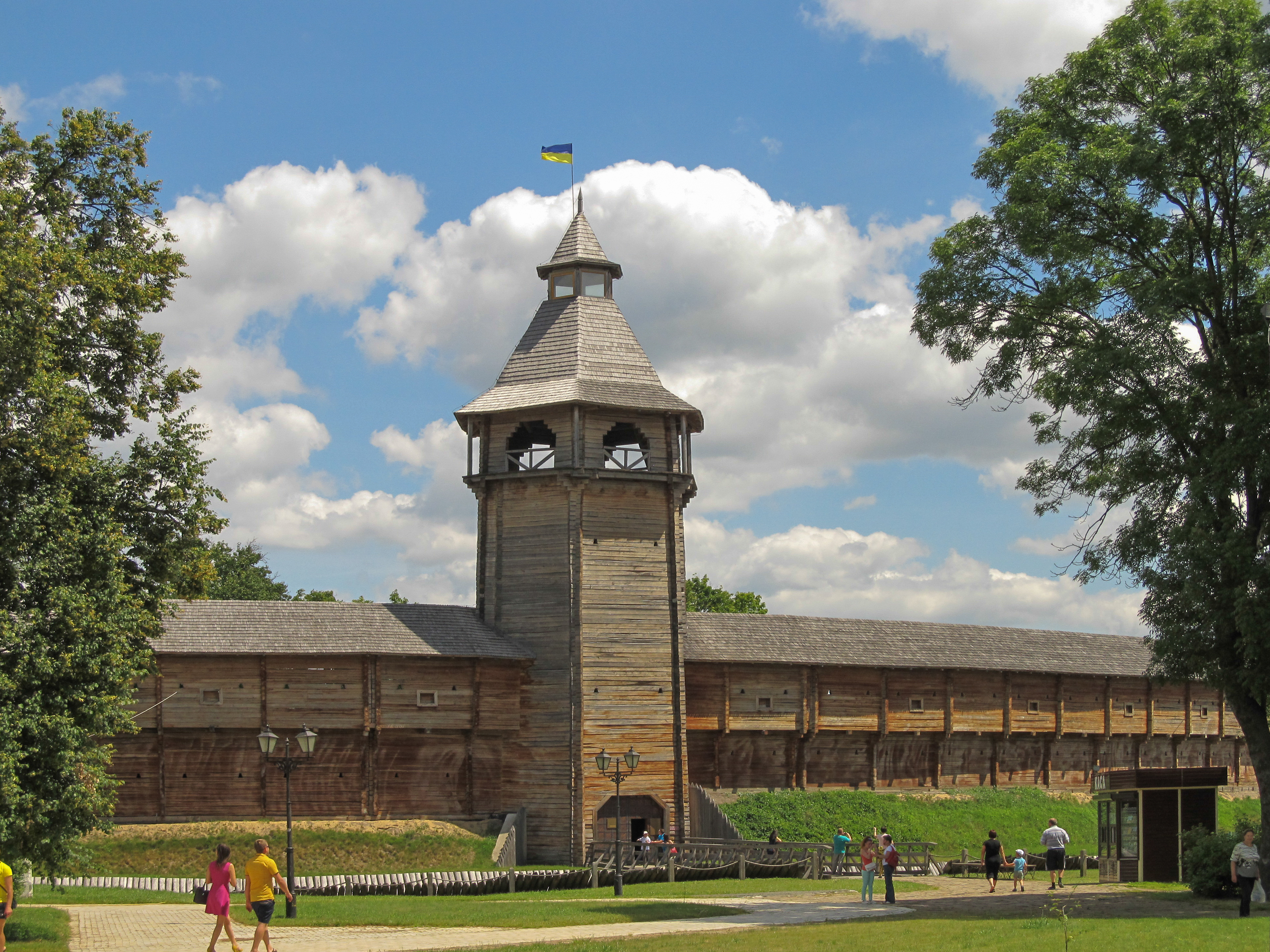 Поселення укріплене багатошарове «Батуринська фортеця», Батурин, між вулицями Партизанською, Петровського, Радянською та провулками Партизанським і Петровського